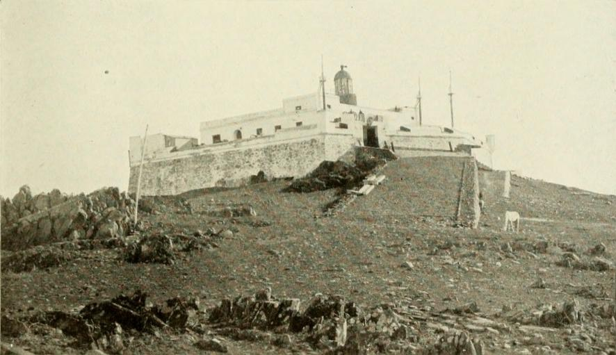 Vista de la fachada de la Fortaleza del Cerro de Montevideo, ubicada en la cima de la elevación que le da nombre a la ciudad, al Oeste de la misma.